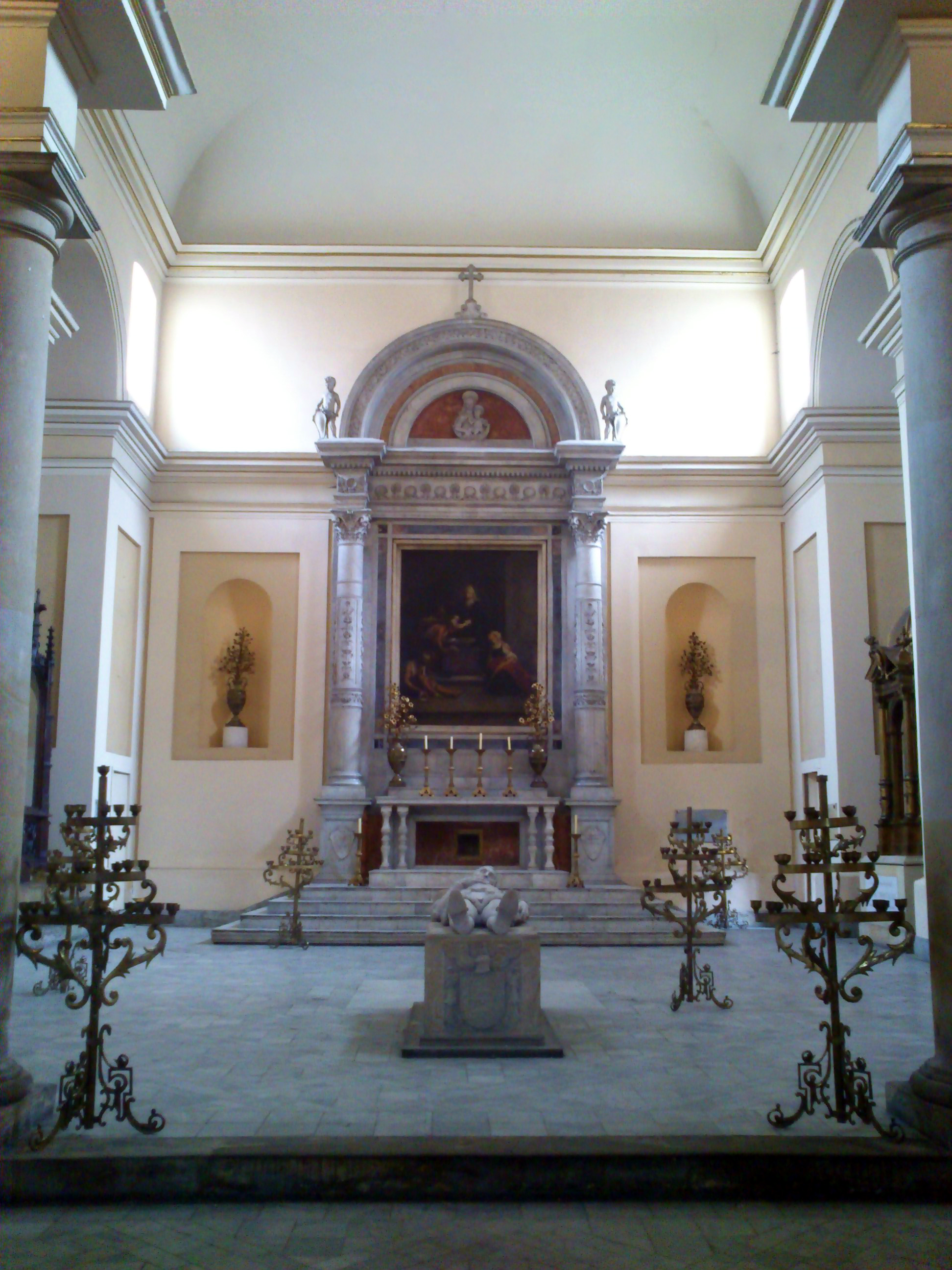 Capilla de Santa Isabel y sarcófago de Gonzalo Jimenez de Quesada